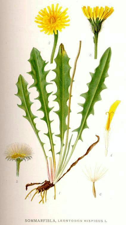 Original Description Sommarfibla, Leontodon hispidus L.